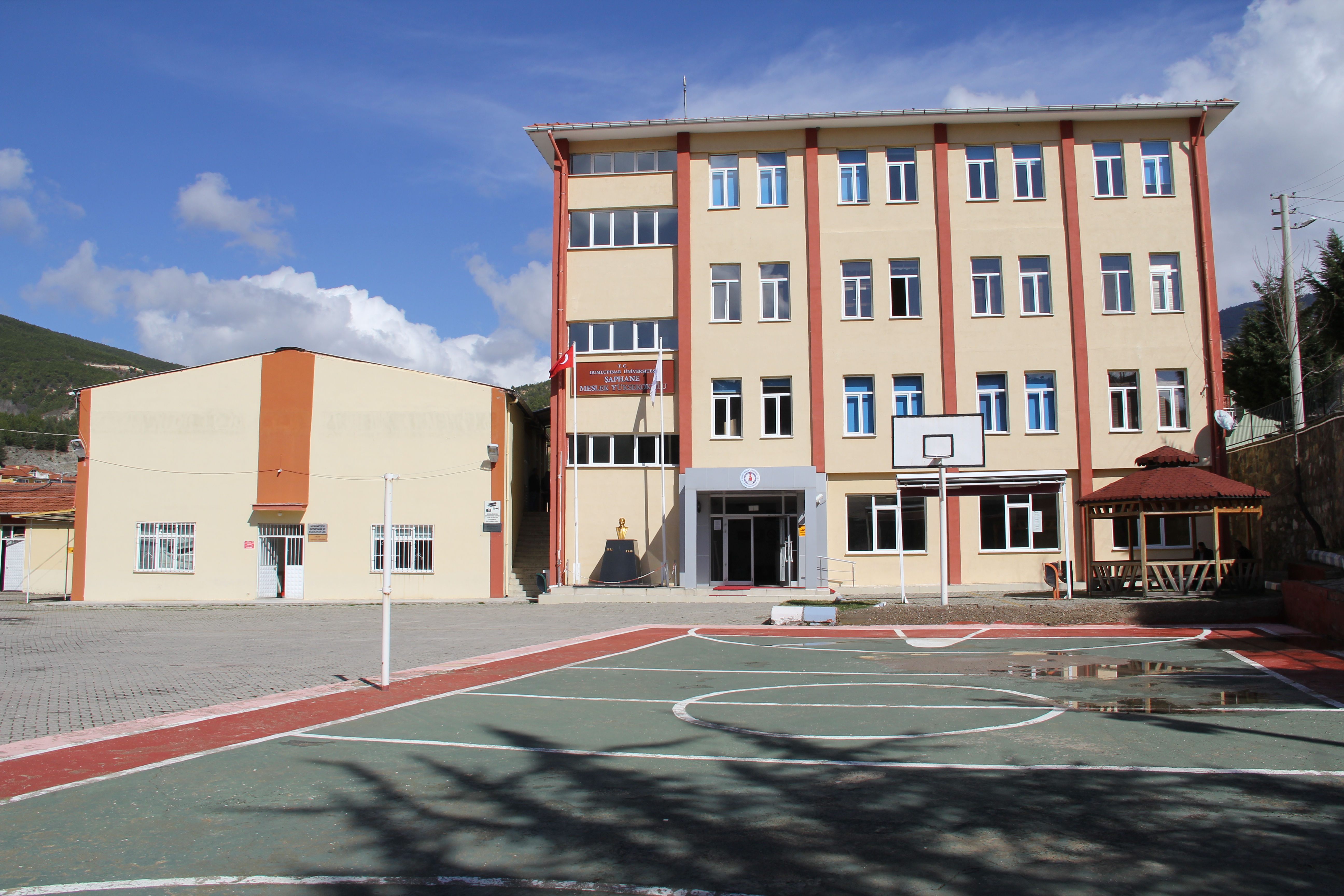 Kütahya Dumlupınar Üniversitesi Şaphane Meslek Yüksekokulu binaları